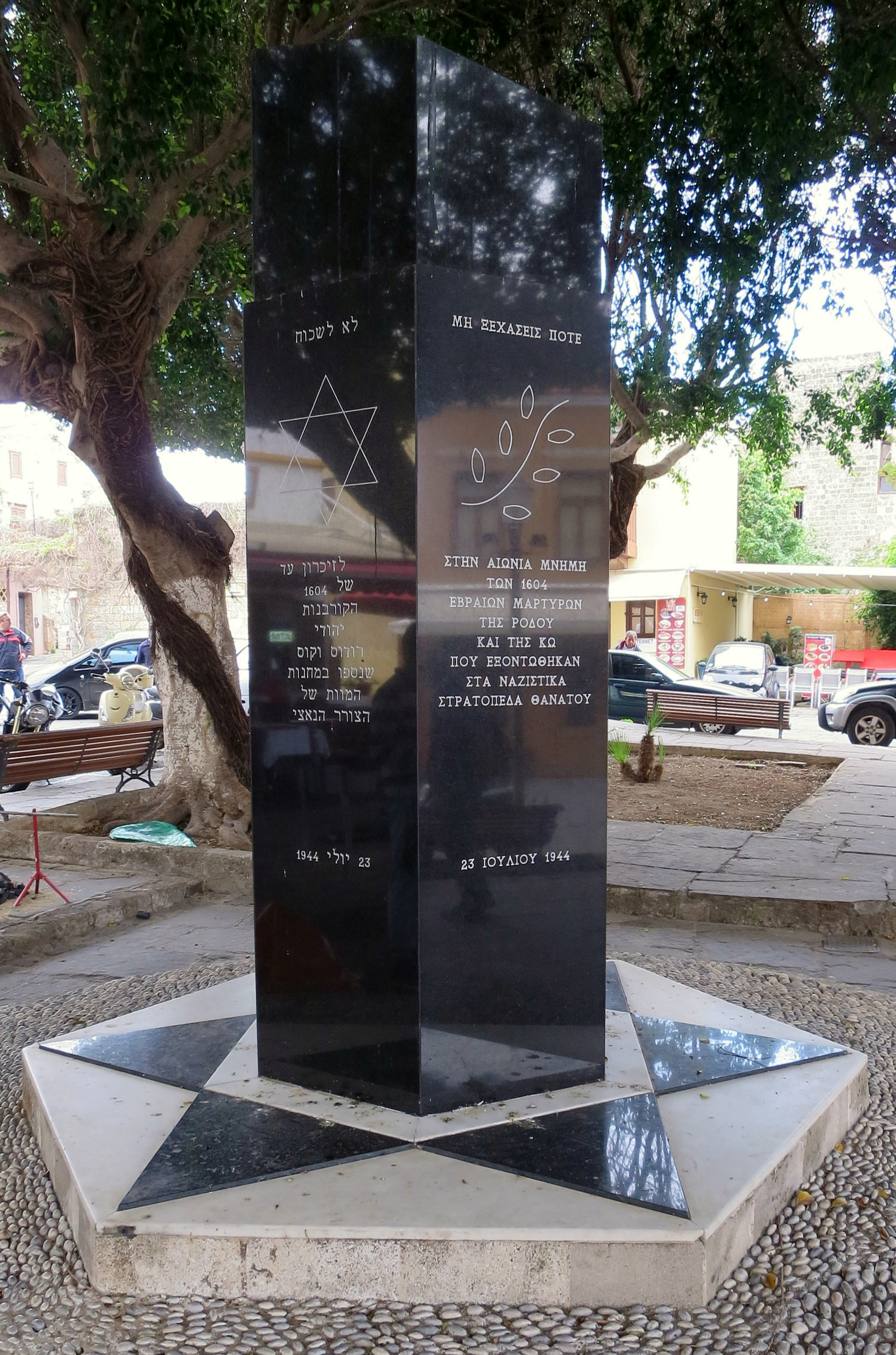 Holocaustdenkmal auf dem Platz der Märtyrer